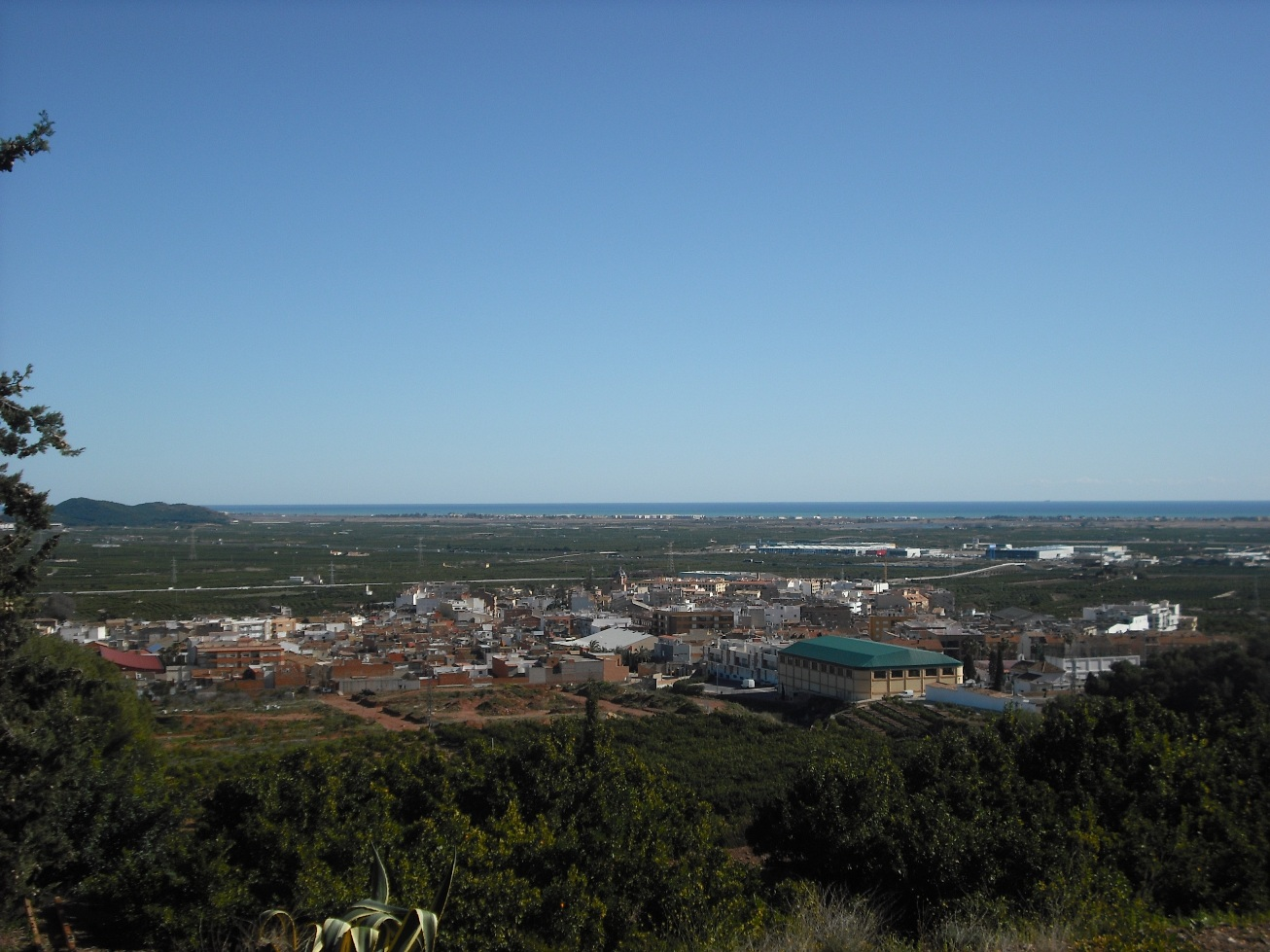 Vista de Faura desde la ermita del Bon Succés de Benifairó de les Valls.